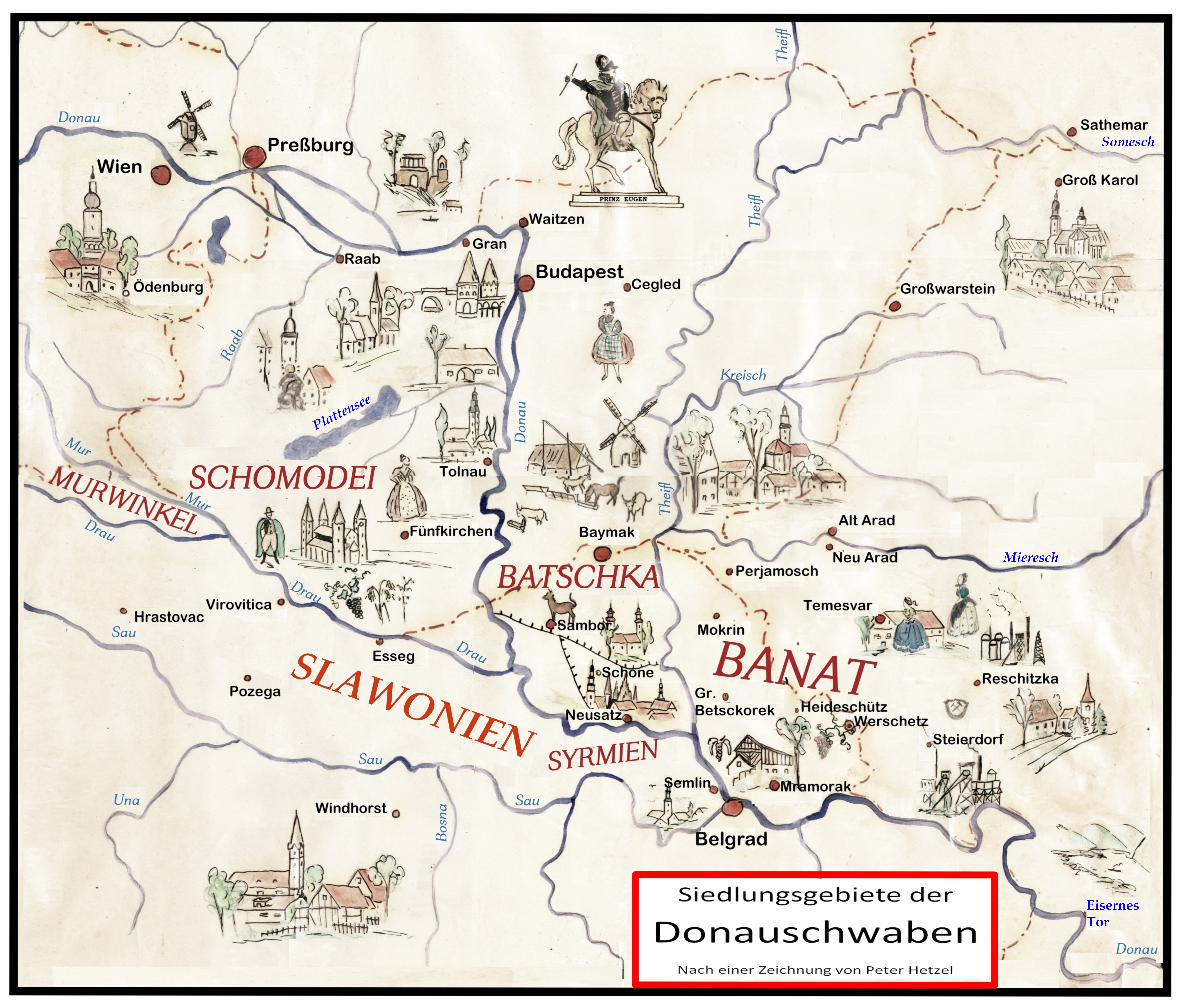 Die Karte zeigt Gebiete mit Dörfern, die bis zum Ende des zweiten Weltkriegs von Donauschwaben besiedelt waren.